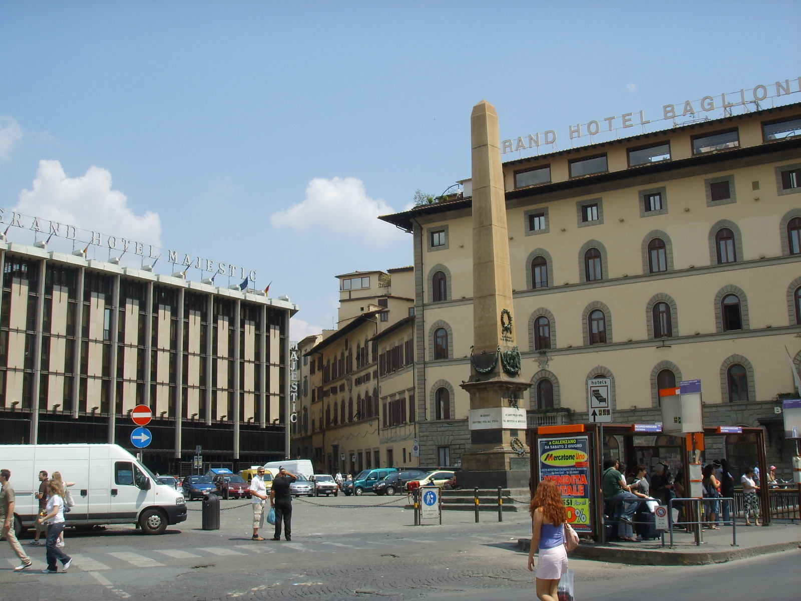 Piazza dell'Unità d'Italia